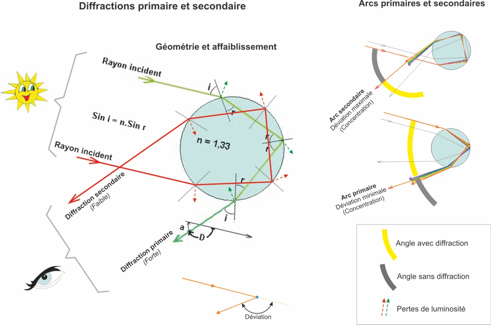 Arc en ciel - Zones de réfraction détaillées